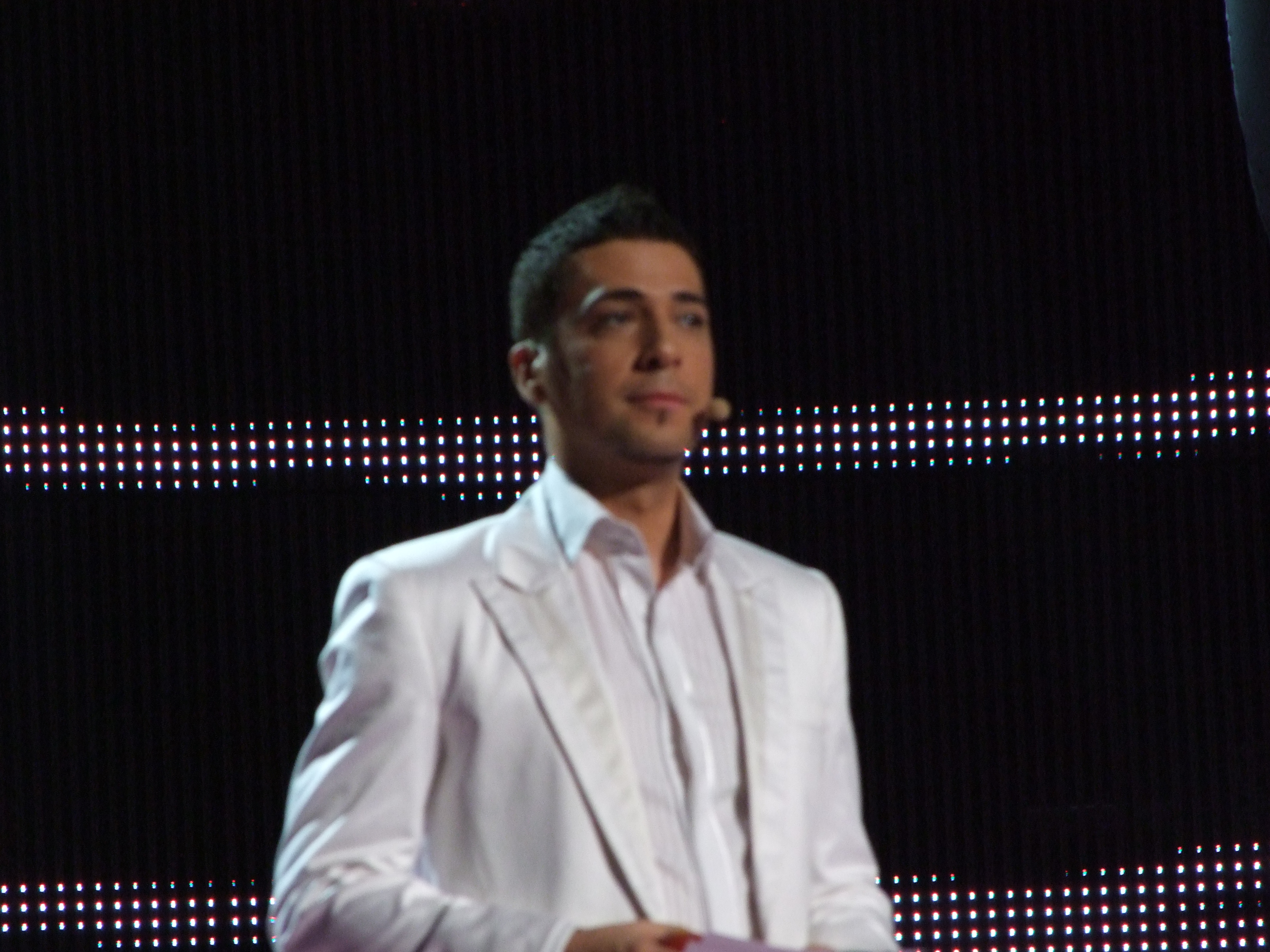 Semifinal 2 Eurovision 2008